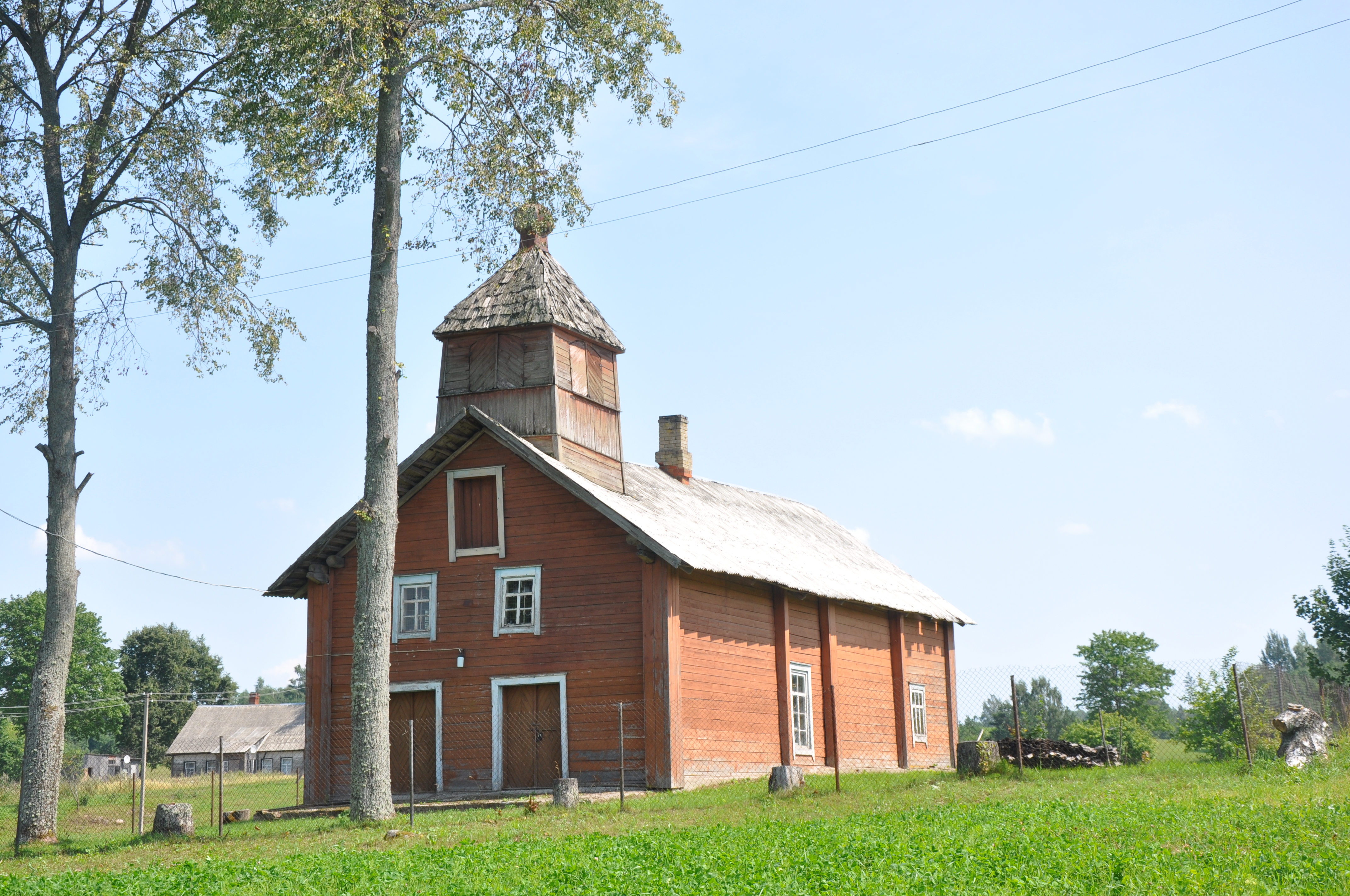 Rudušku Vecticībnieku lūgšanu nams, Ruduški, Andzeļu pagasts, Dagdas novads, Latvia